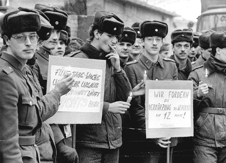 Cottbus, Soldatendemonstration ADN-ZB Weisflog 12.1.90 Cottbus: Soldatendemonstration- Auf einer gemeinsamen Demonstration in der Albert-Zimmermann-Kaserne forderten am 3.1.1990 Angehörige von zwei Truppenverbänden der NVA des Cottbusser Raumes eine sofortige Miltärreform, verbunden mit einer Reduzierung der Wehrdienstzeit auf 12 Monate.